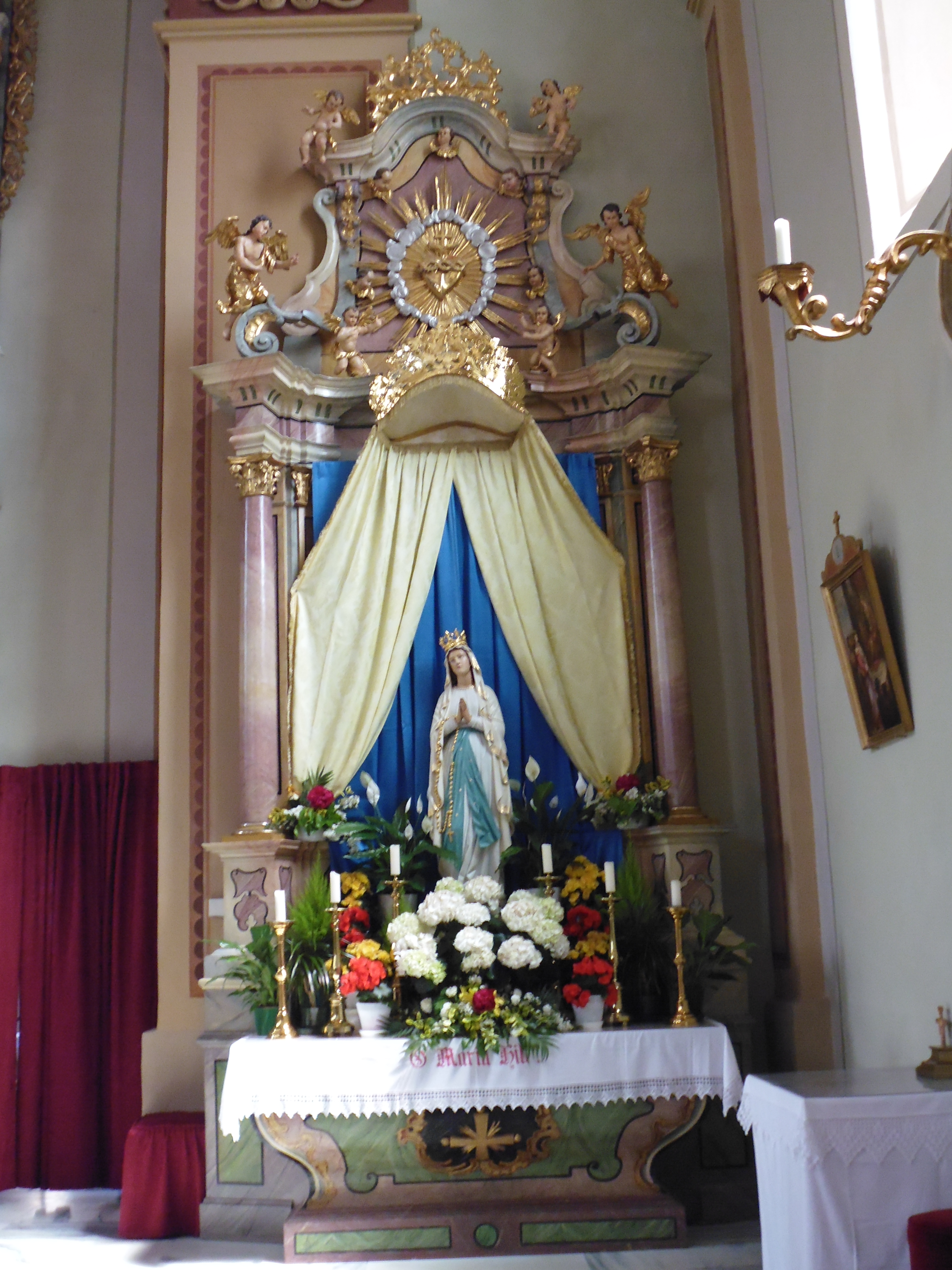 Pfarrkirche in Laas